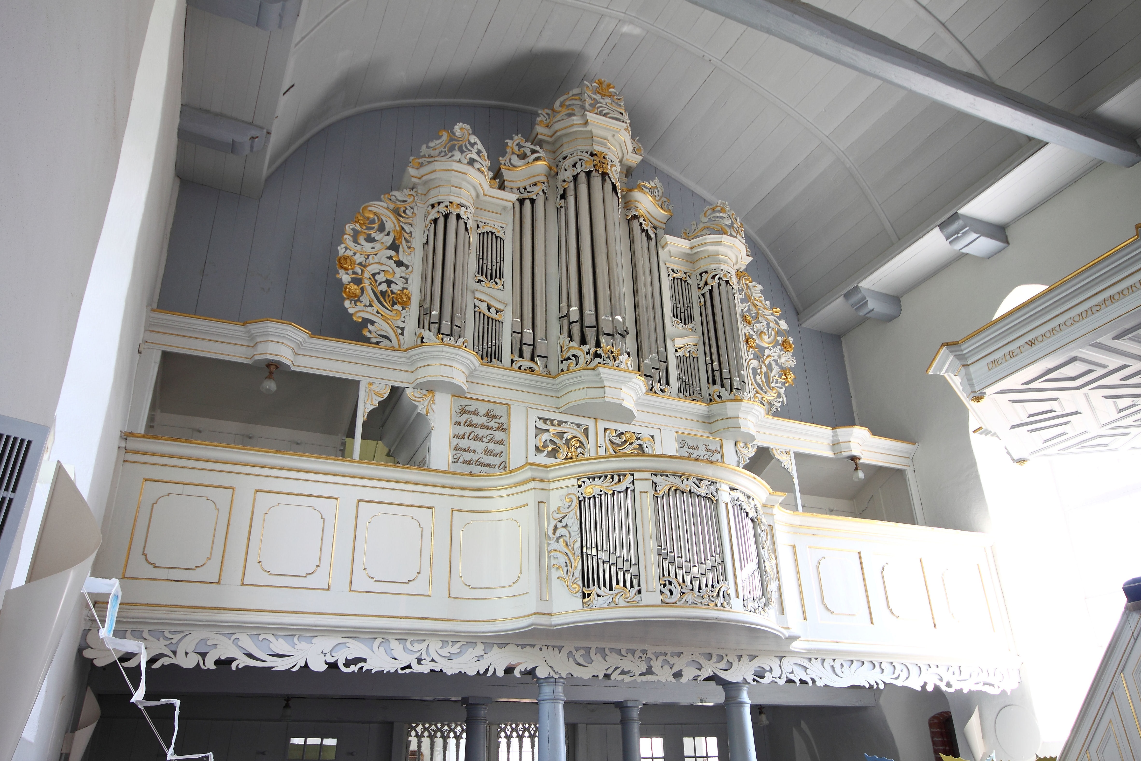 Orgel in Manslagt, Landkreis Aurich